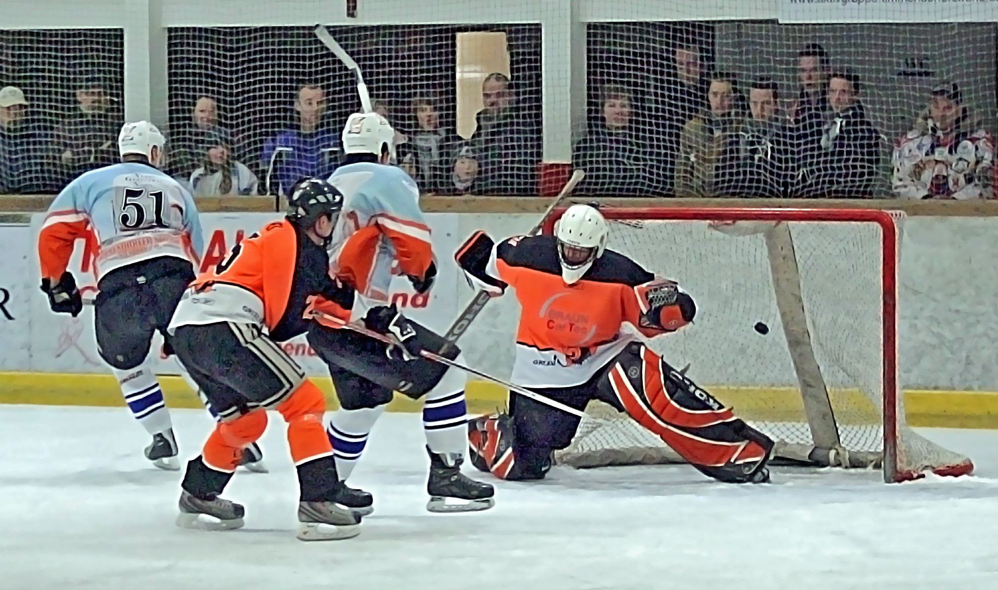 Torschuß des ETC Timmendorfer Strand während der Sasion 09